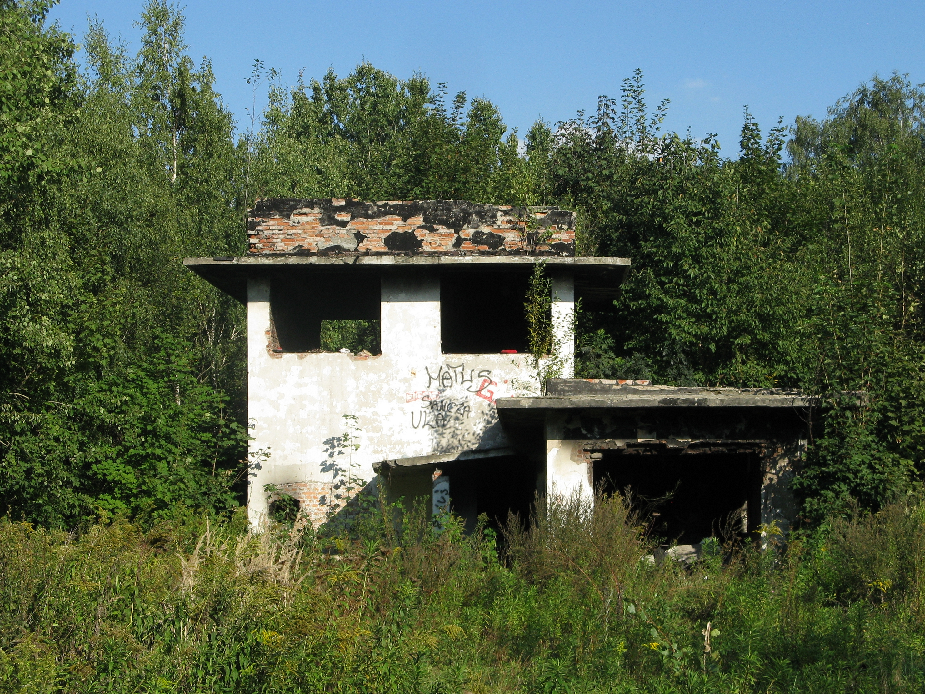 zrujnowana nastawnia posterunku odgałęźnego Karol Miarka Kopalni Piasku Podsadzkowego Szczakowa w Bytomiu-Rozbarku